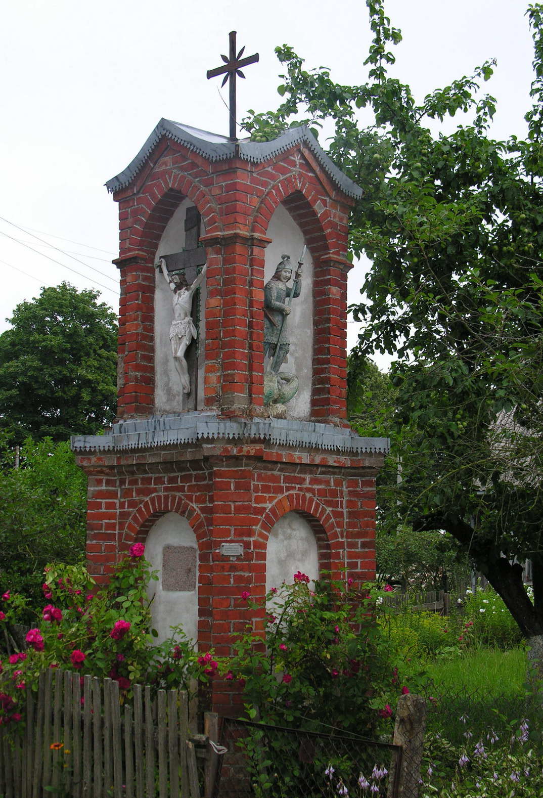 Leckavos koplytėlė Foto: Algirdas, 2005 m. liepos 22 d.